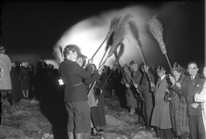 Die grosse Walpurgisfeier auf dem Brocken im Harz ! Der heilige Gedächtnistag der Patronin "Walpurga" gegen Hexenkünste ! Der Hexentanz der Geister um Mitternacht auf dem Brocken.